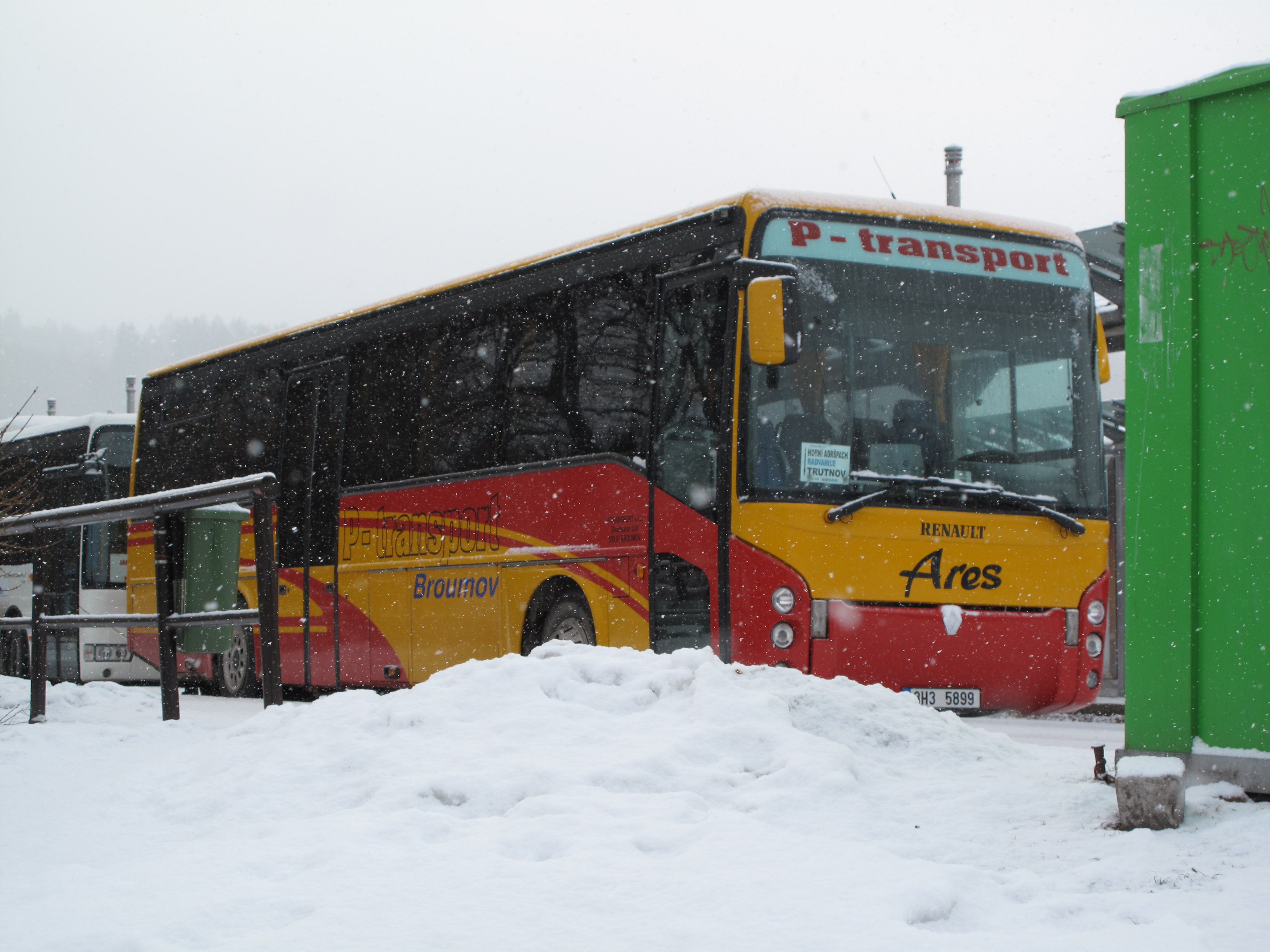 Autobus Renault Ares v Trutnově.